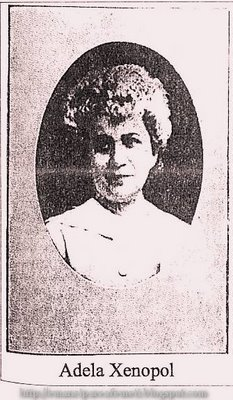 Adela Xenopol